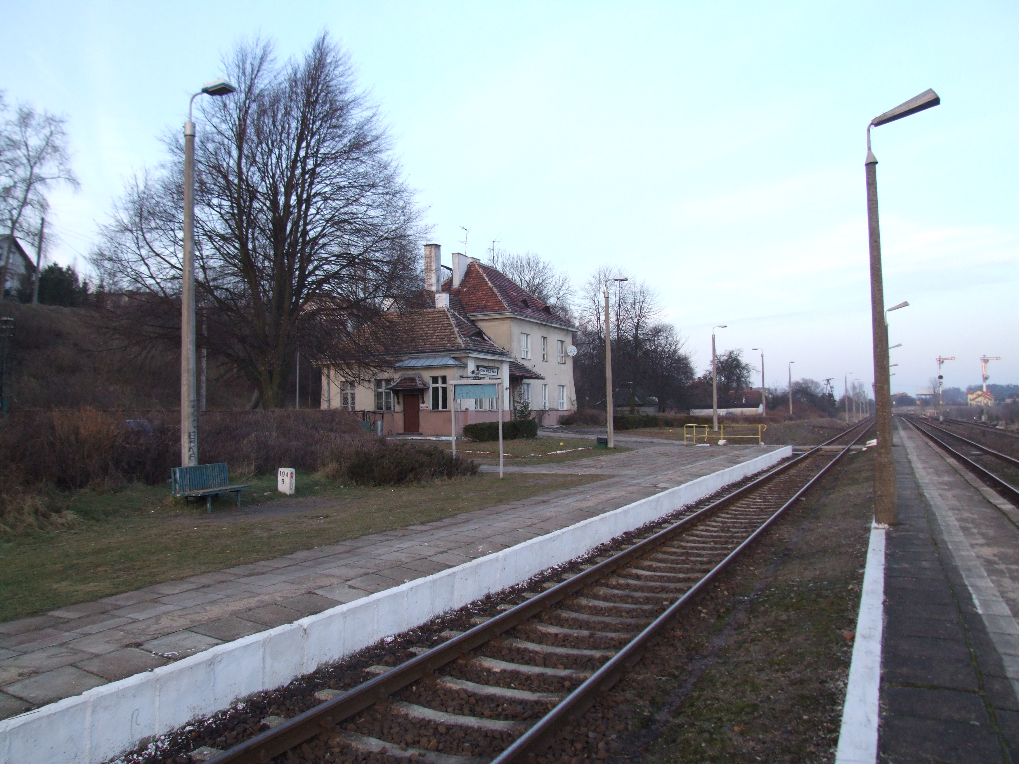 stacja kolejowa Gdynia Wielki Kack